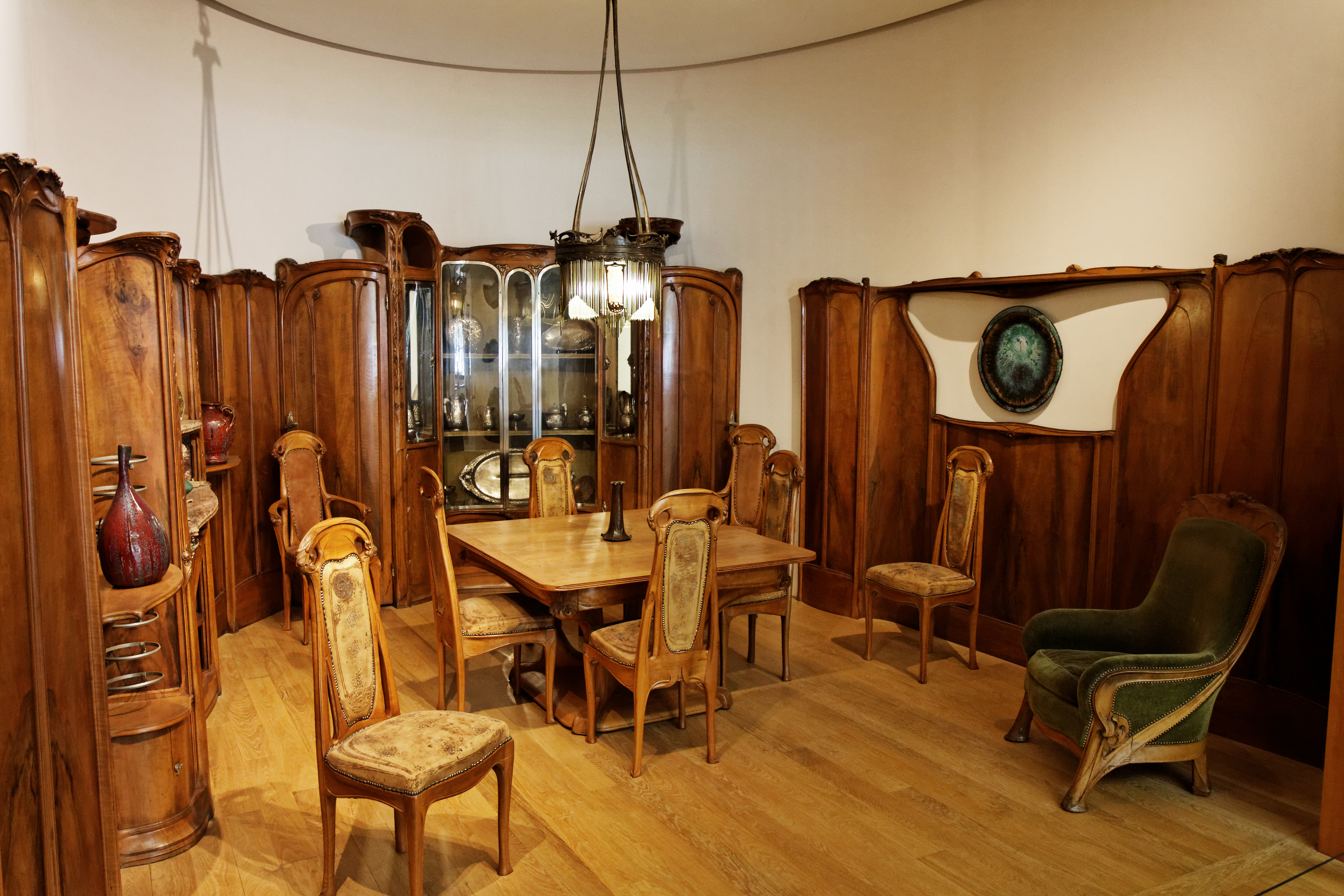 Hector Guimard: (Français, 1867-1942): Salle à manger de la maison Guimard, construite en 1909 en bois de poirier, reconstituée au Petit Palais à Paris suite à une donation de la veuve de l'architecte à la fin des années 1940. Musée des Beaux-Arts de la Ville de Paris, Petit Palais, Paris, France.